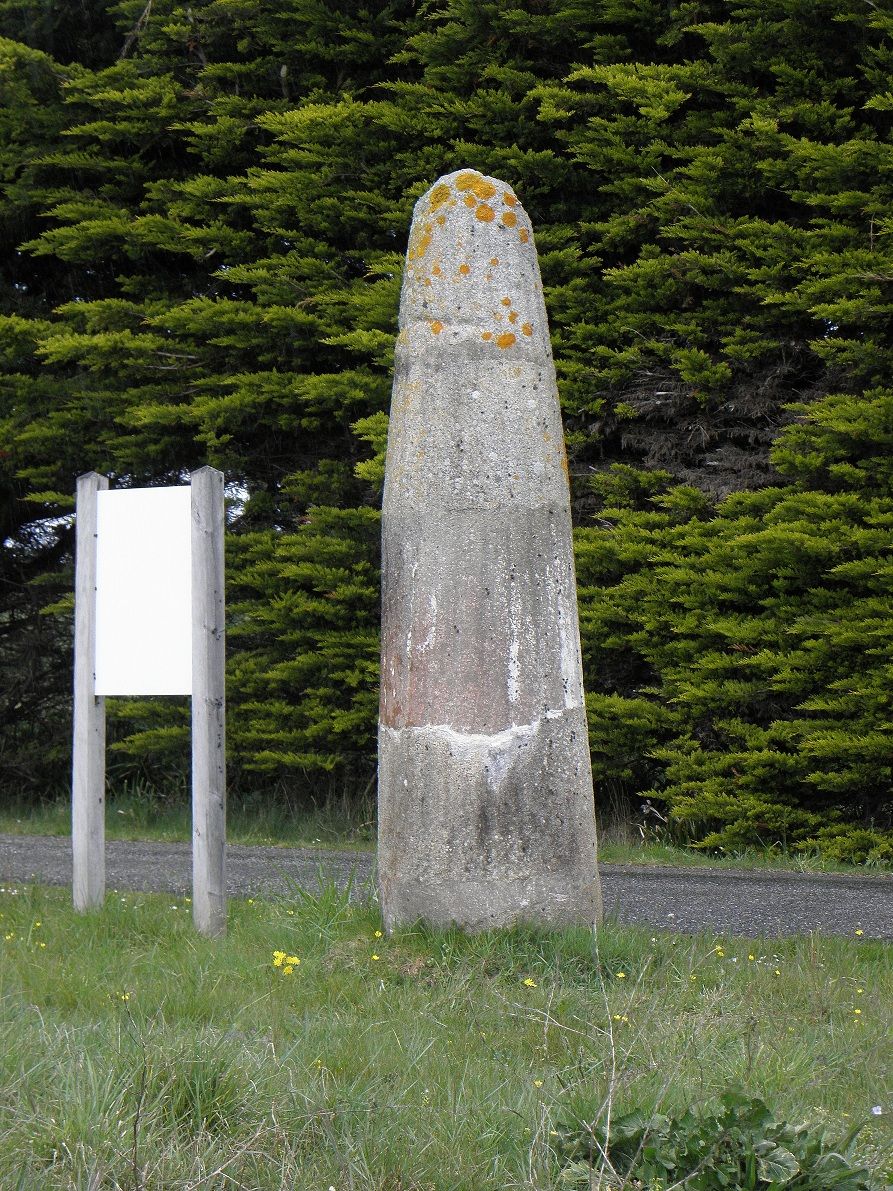 Stèle cannelée de Kerveltré en Saint-Jean-Trolimon (29).